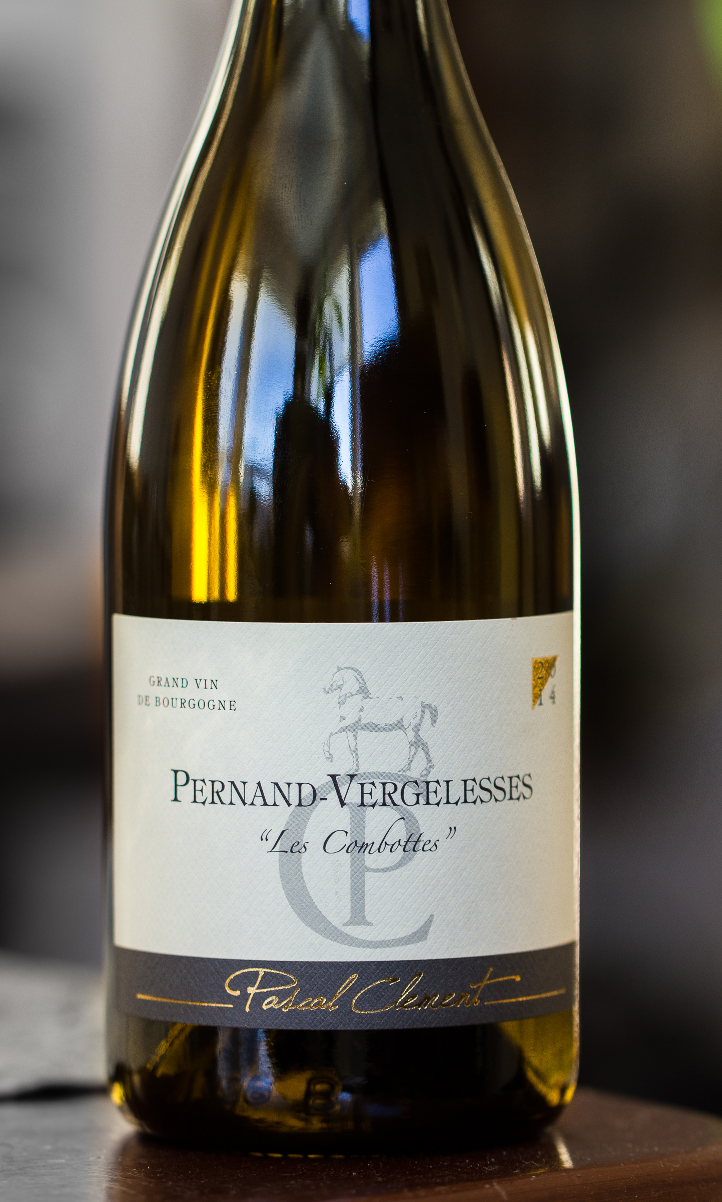 Hvitvin, chardonnay, fra den franske vinprodusenten (Negociant) Pascal Clément fra Savigny-Les-Beaune, Beaune, Côte de Beaune, Burgund. Fra vinmarken Pernand-vergelesses «Les Combottes».